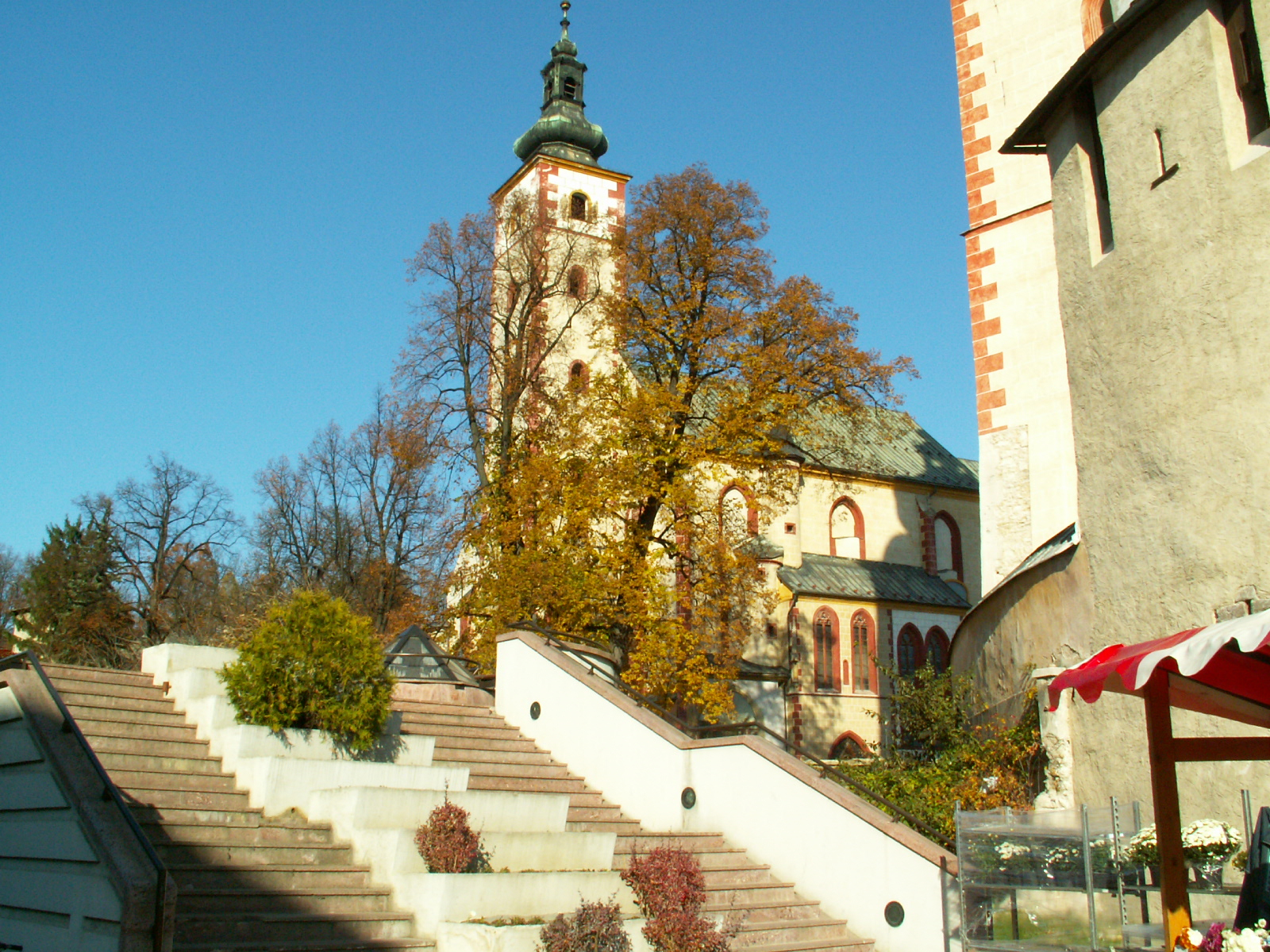 Areál hradu, rímskokatolícky kostol sv. Kríža (slovenský)